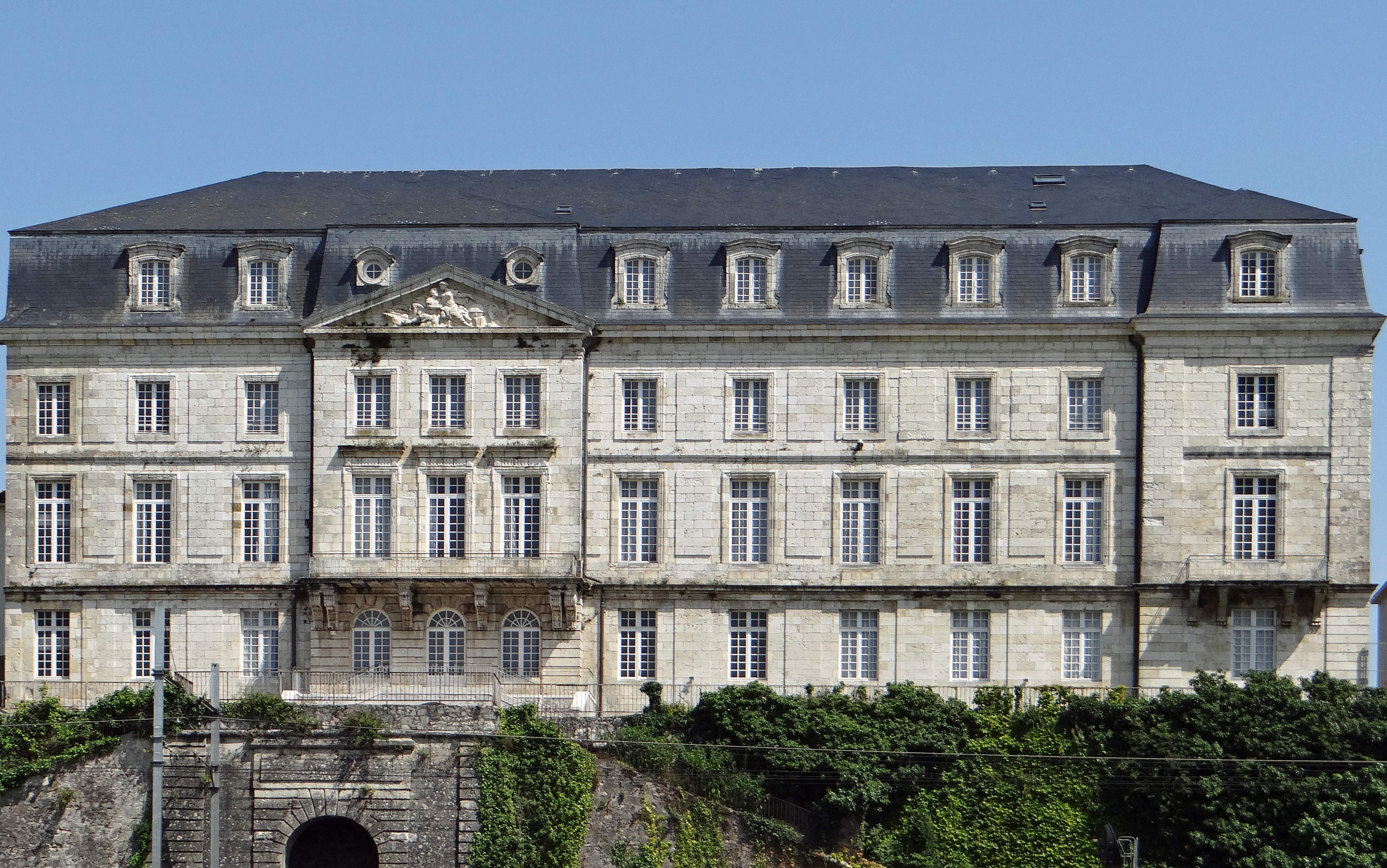 Château d'Aiguillon - Façade côté campagne